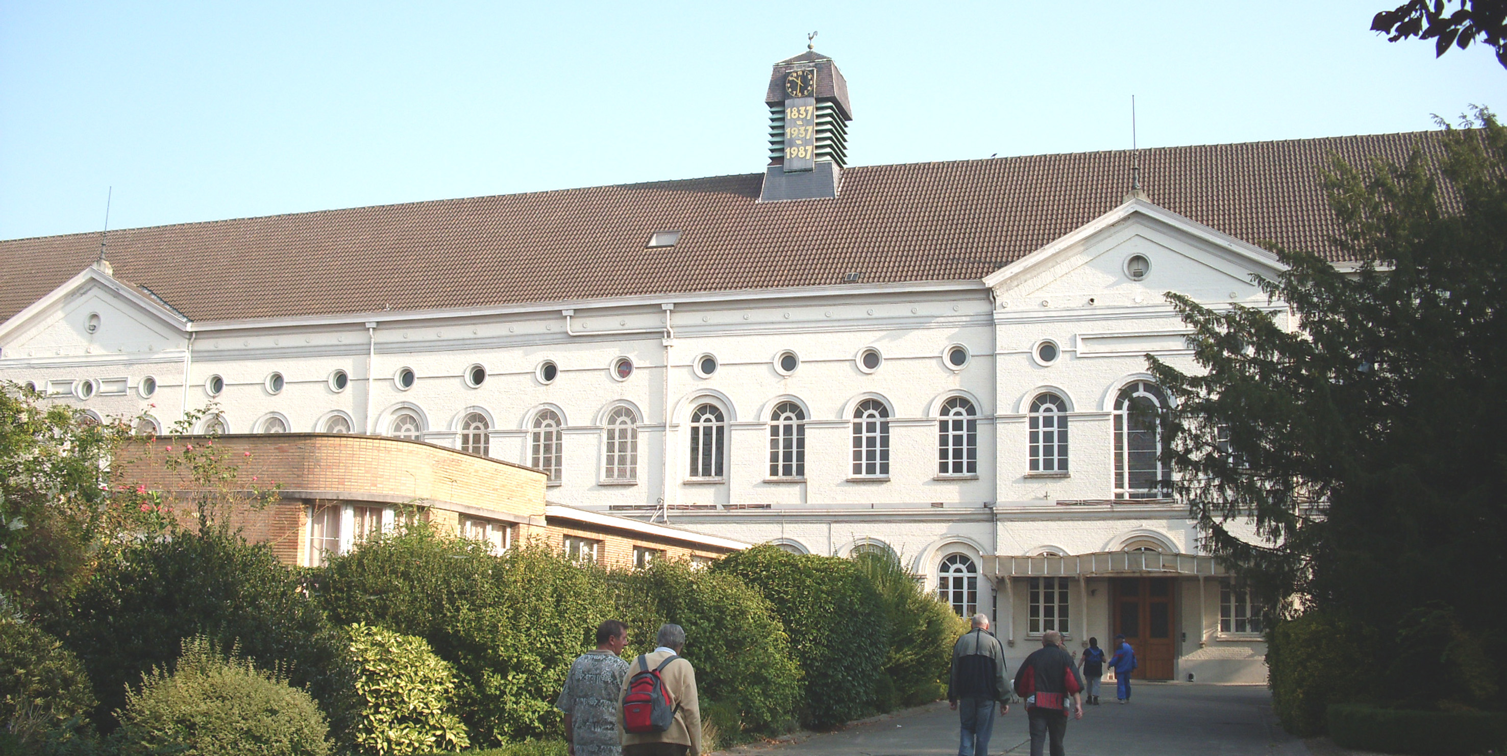 Voorgevel van het Jozefietencollege - Brusselsesteenweg - Melle - Oost-Vlaanderen - Vlaanderen - België